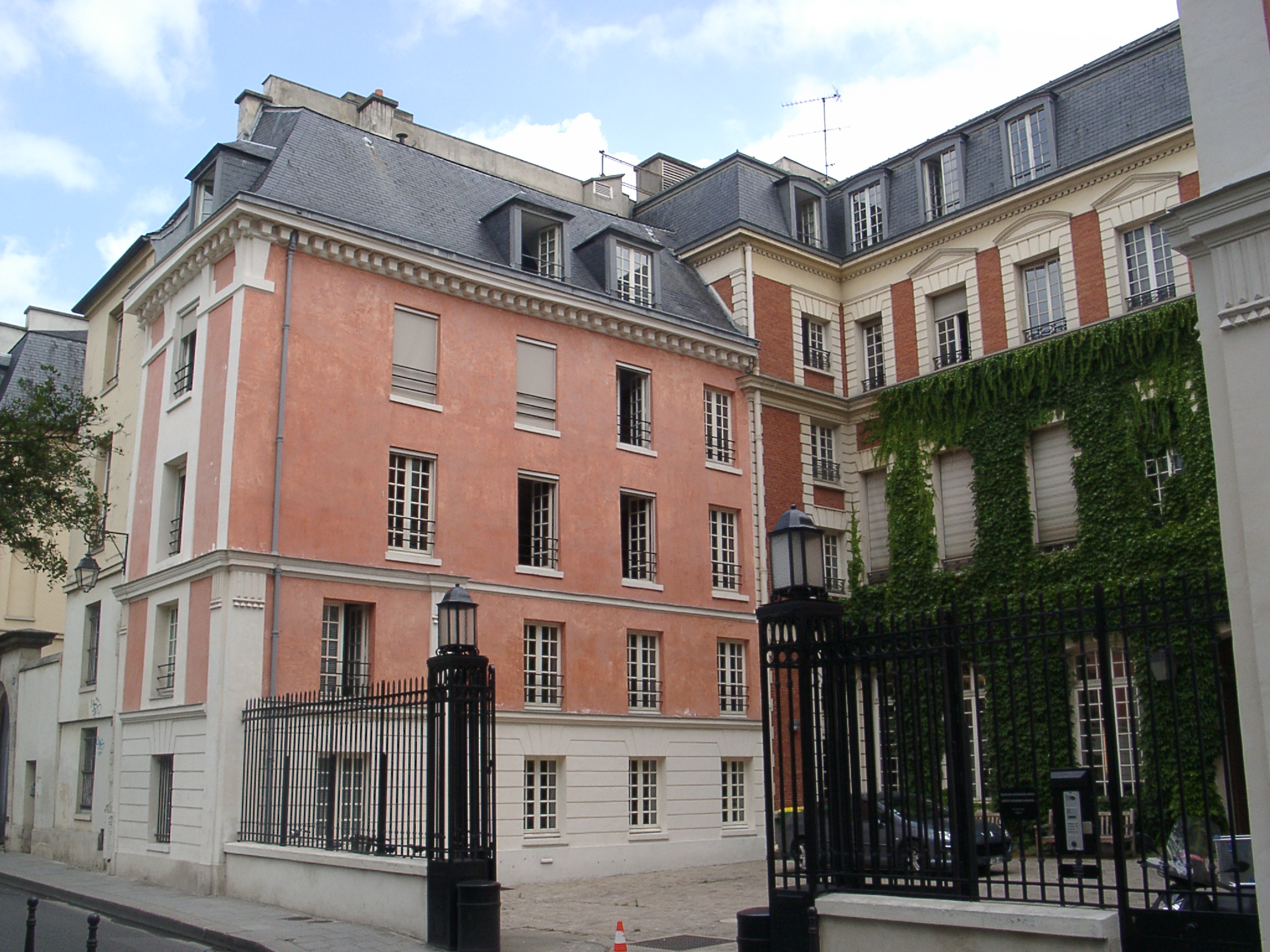 Deutsches Historisches Institut Paris (DHI), Hôtel Duret de Chevry, rue du Parc-Royal no 8, IIIe arrondissement, Paris, France.